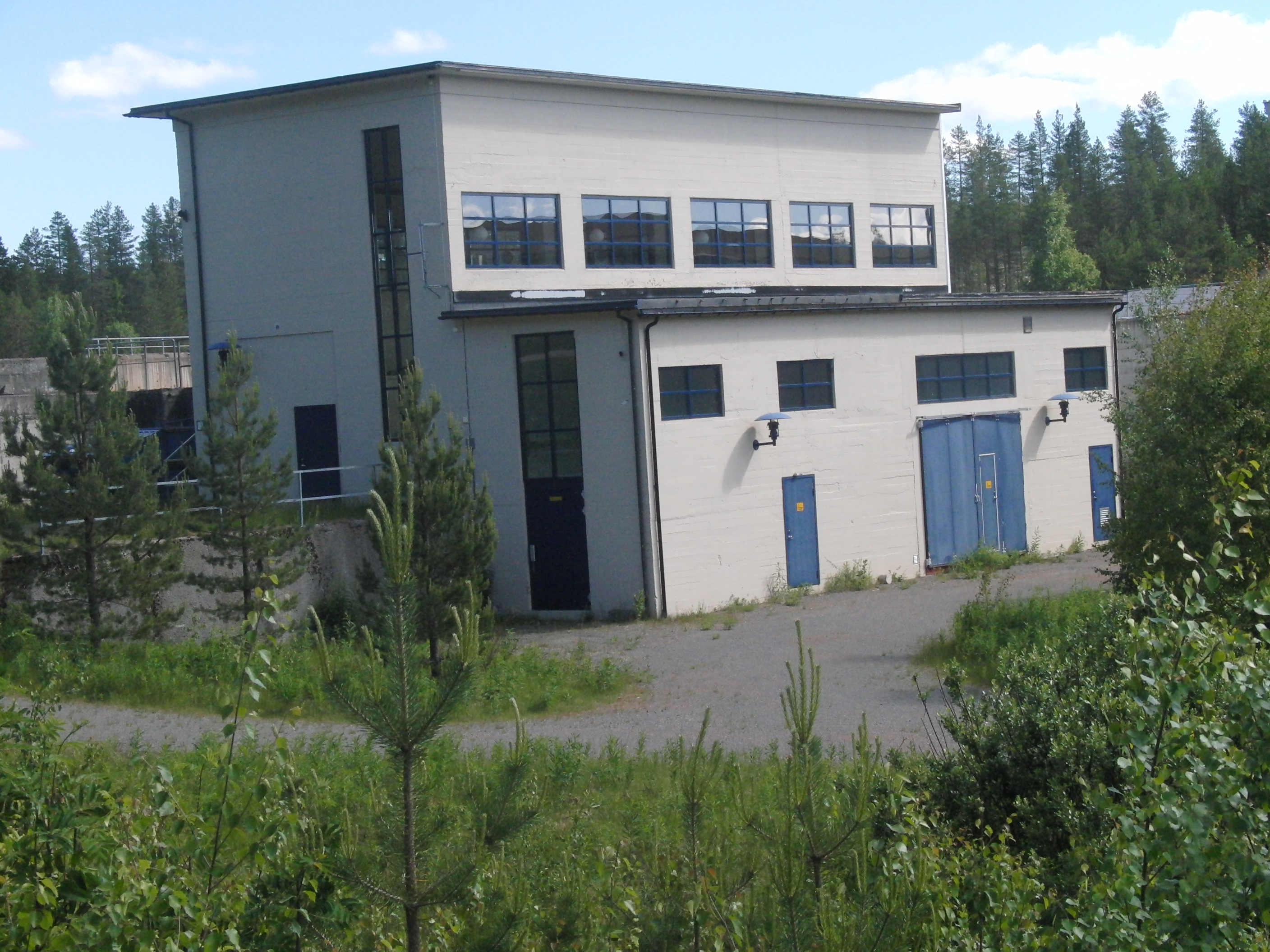 Sagnfossen gamle kraftverk